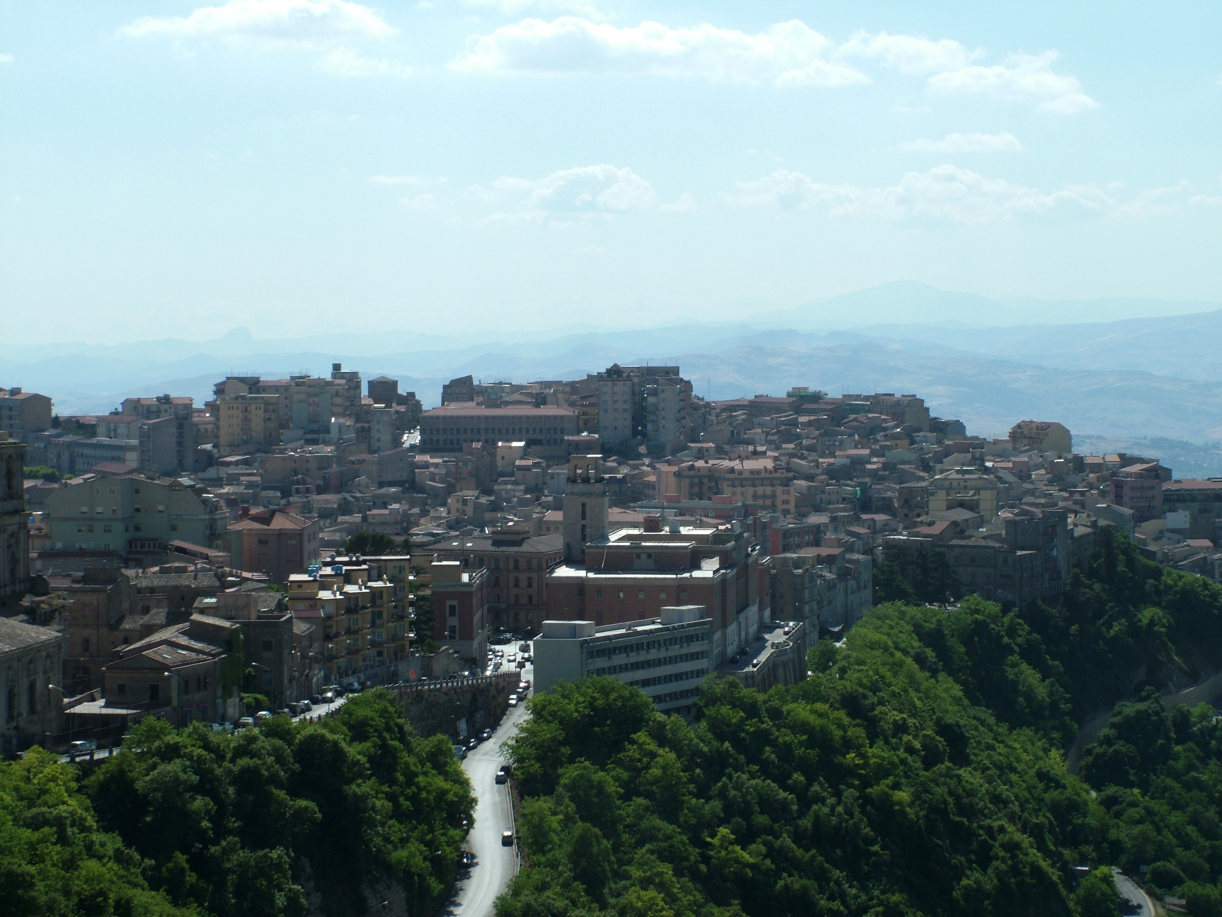 Enna, Sizilien, die Innenstadt von Castello di Lombardia